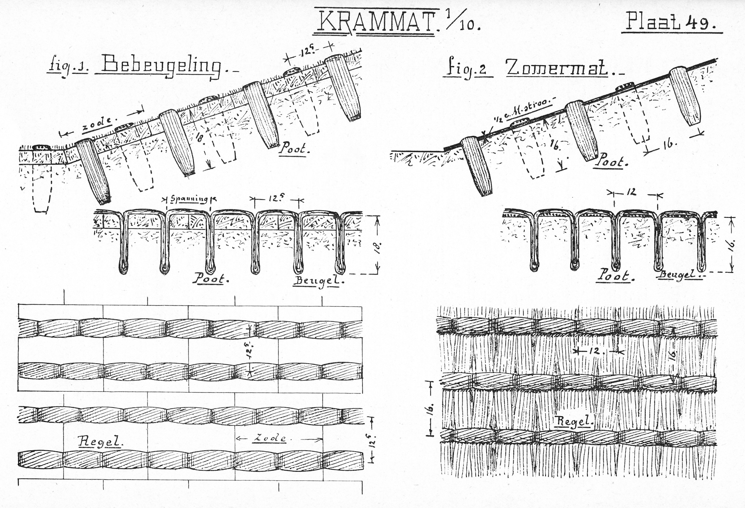 Krammat ter bescherming van een kleitalud onder zomercondities.